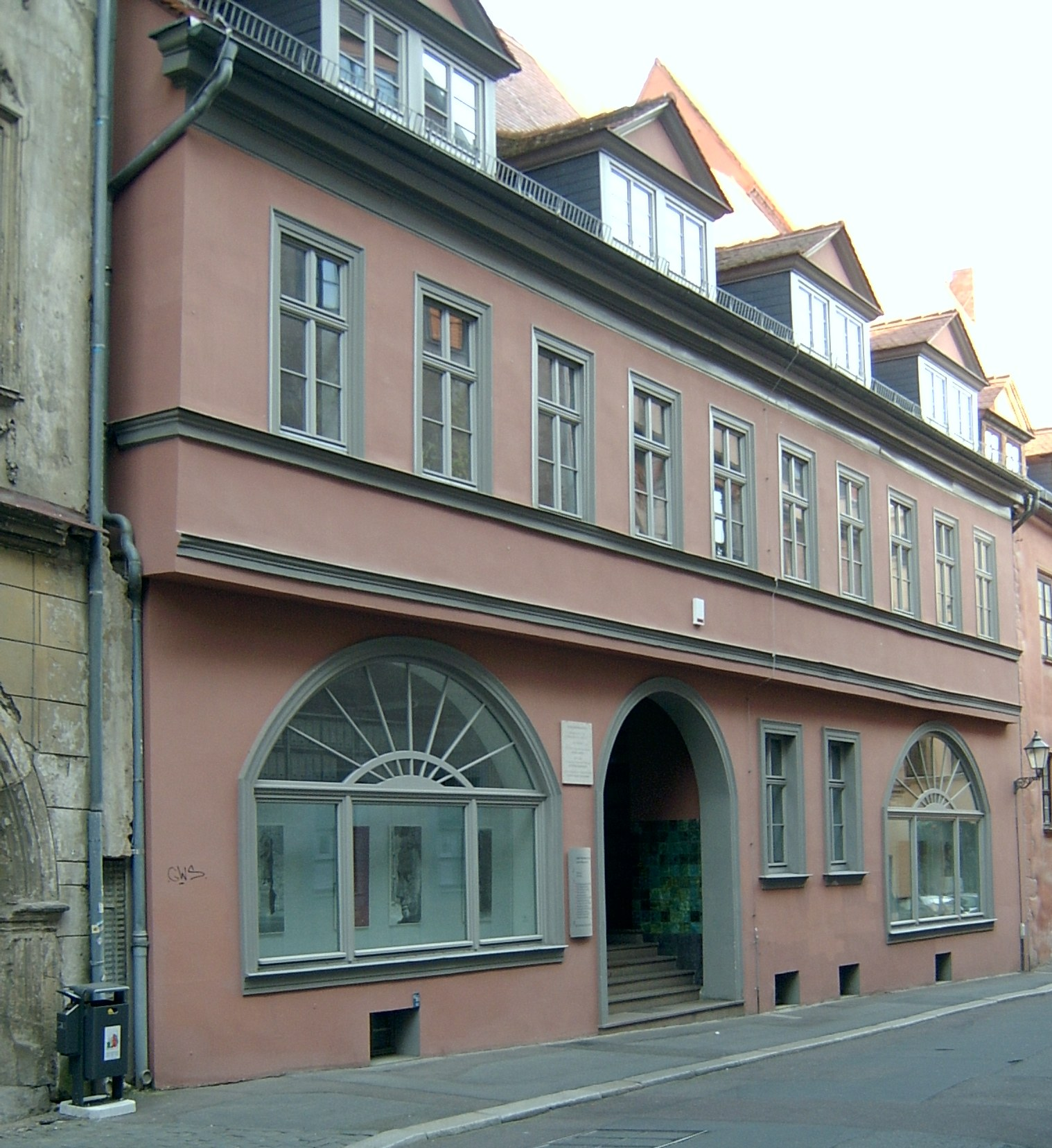 Große Märkerstraße 6 in Halle (Saale)